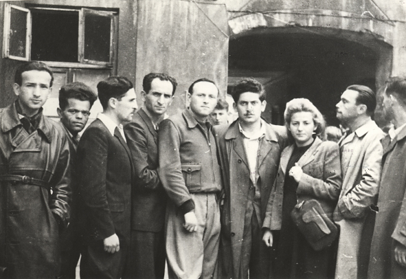 מנהיגי ארגון הבריחה עם צבי נצר (רביעי מימין)